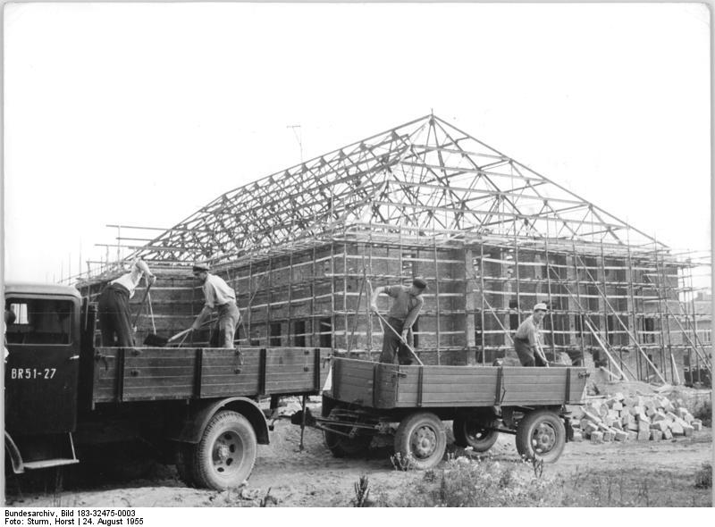 Mestlin, Bau des Kulturhauses Zentralbild Sturm 16 Motive-24.8.1955 Zum 10. Jahrestag der demokratischen Bodenreform -Das neue Gesicht des Dorfes Mestlin - Seitdem durch die Durchführung der demokratischen Bodenreform 3.298.062 ha Land von ehemals 7170 Junkern und Großagrariern an landarme Bauern, Landarbeiter und Umsiedler verteilt wurden, hat sich das Leben der Landbevölkerung in der Deutschen Demokratischen Republik immer reicher und glücklicher gestaltet. Auch in Mestlin (Kreis Parchim), einem alten mecklenburgischen Dorf, ist der Wohlstand eingezogen und der Borgermeyer, ehemaliger Besitzer des Mestliner Gutes, würde das Dorf und seine "Tagelöhner" nicht wiedererkennen. Mestlin wurde zu einem großen Bauplatz. Neben den ehemaligen Katen entstanden moderne zweistöckige Wohnhäuser, neben den baufälligen Scheunen ein Landambulatorium und ein Kulturhaus. Die Mütter geben ihre Kinder in den herrlichen Kindergarten und die Kinderkrippe. Das Vieh der Genossenschaftsbauern ist in modernen Stallungen untergebracht und die MTS Mestlin ersetzt mit ihren modernen Maschinen wertvolle Menschenkraft. UBz: Vor wenigen Tagen wurden die Arbeiten an der 24 Tonnen schweren Dach-Stahlkonstruktion auf dem Kulturhaus Mestlin beendet. Mit Riesenschritten geht nun der Kulturhausbau seiner Vollendung entgegen. Schon bald wird es das Zentrum des kulturellen Lebens für Mestlin und Umgebung sein. Nach Fertigstellung wird sich im Erdgeschoß ein großer Theaterraum, Umkleideräume, Imbißstube, ein großer Klubraum mit allen Bequemlichkeiten befinden. Das Kulturhaus enthält ferner ein Kino, Hörsaal, Leseräume, Bibliothek, Musik-, Turn- und Gymnastikräume.